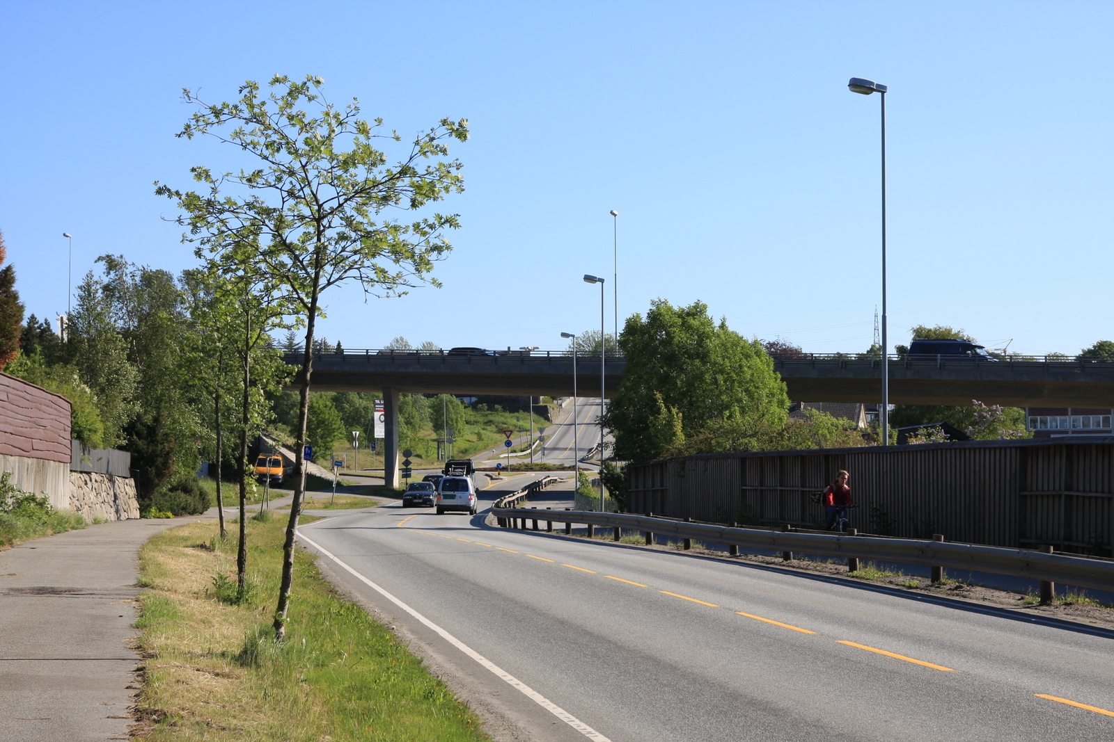 Fylkesvei 330 (Hoveveien)